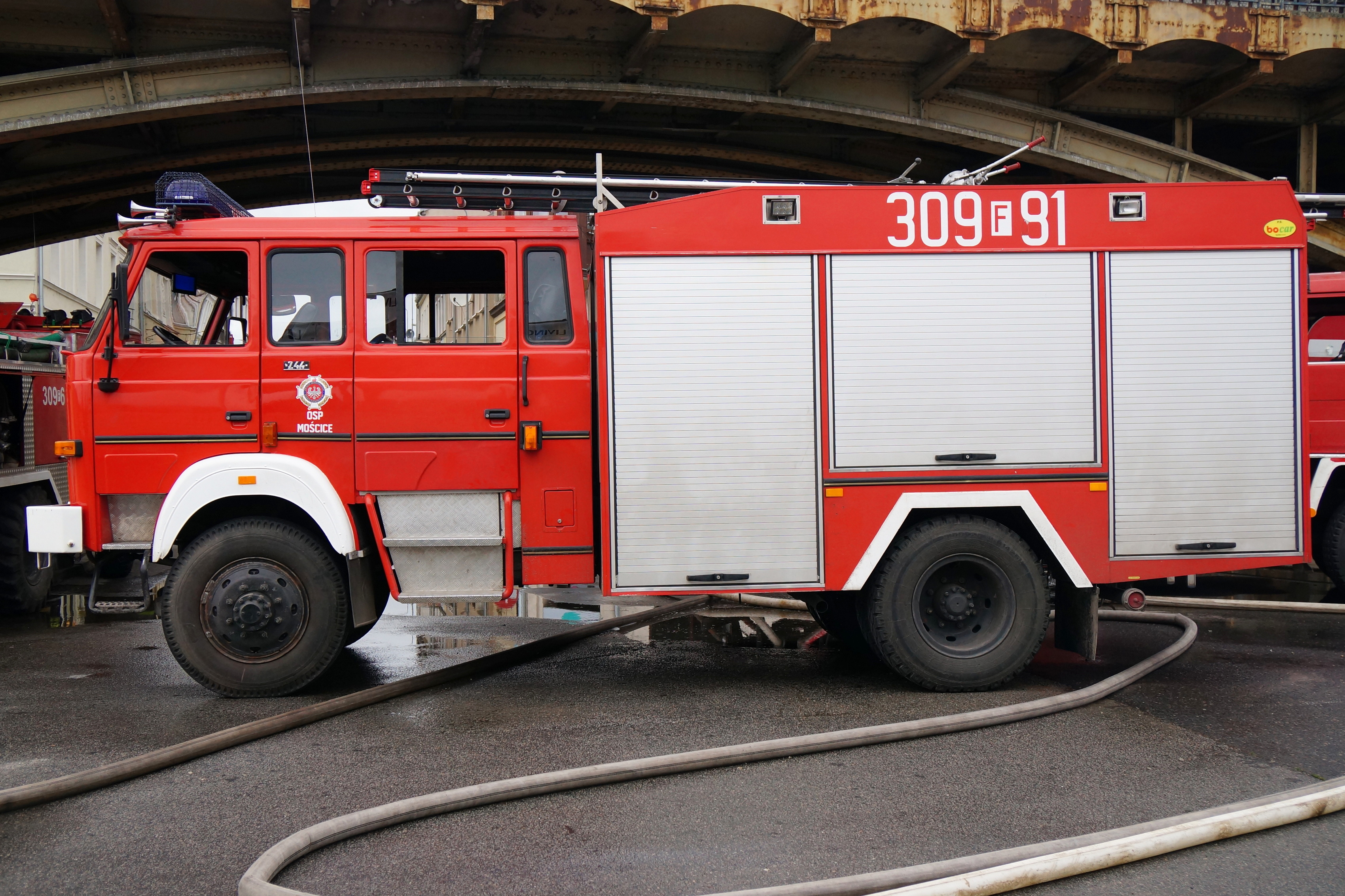 Średni samochód ratowniczo-gaśniczy Star 244L 4x4 GBA 2,5/16, zabudowa P.S. Bocar, eksploatowany przez OSP Mościce. Podczas akcji gaśniczej w Gorzowie Wlkp.